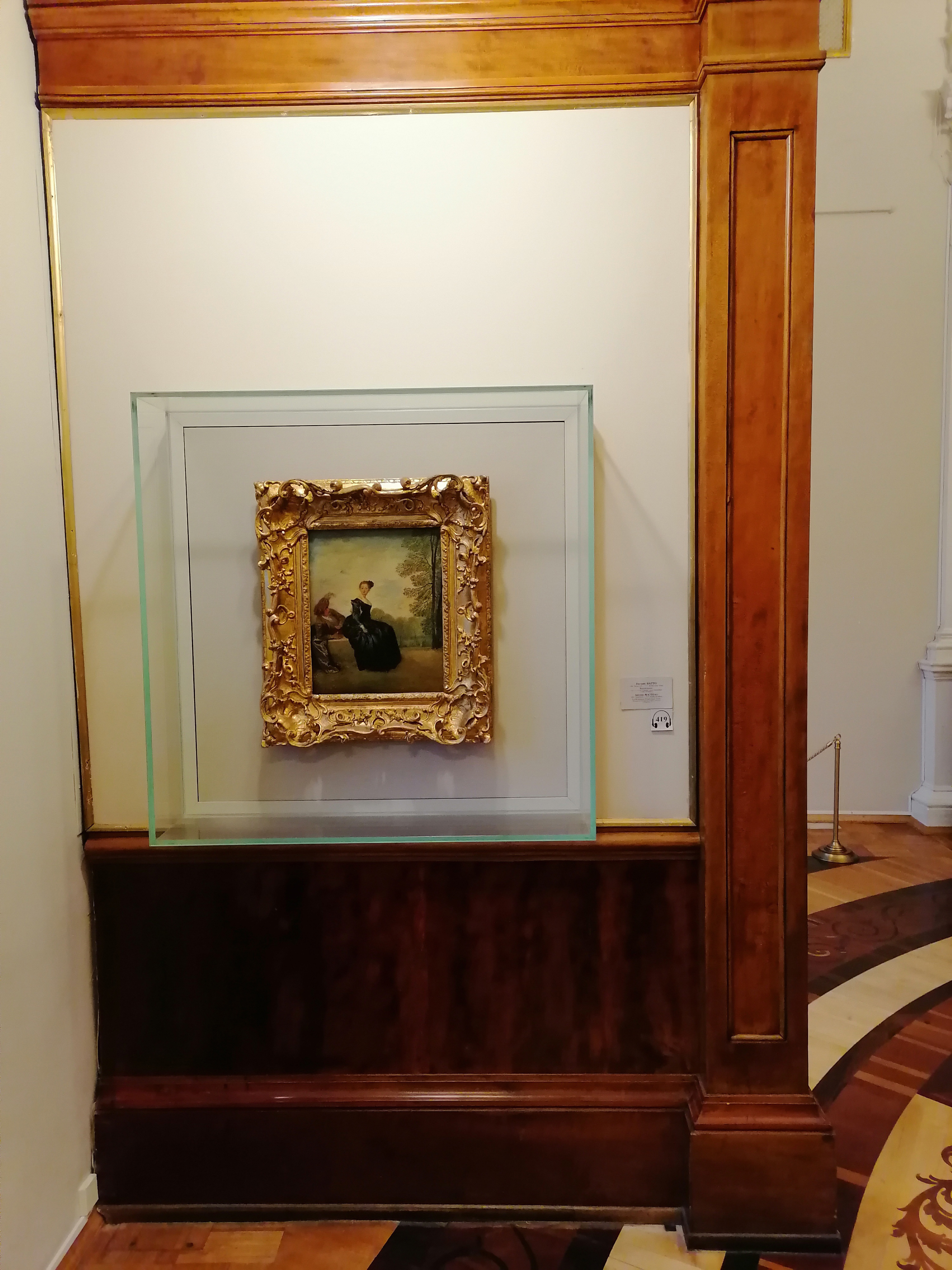 Зимний дворец - зал 284